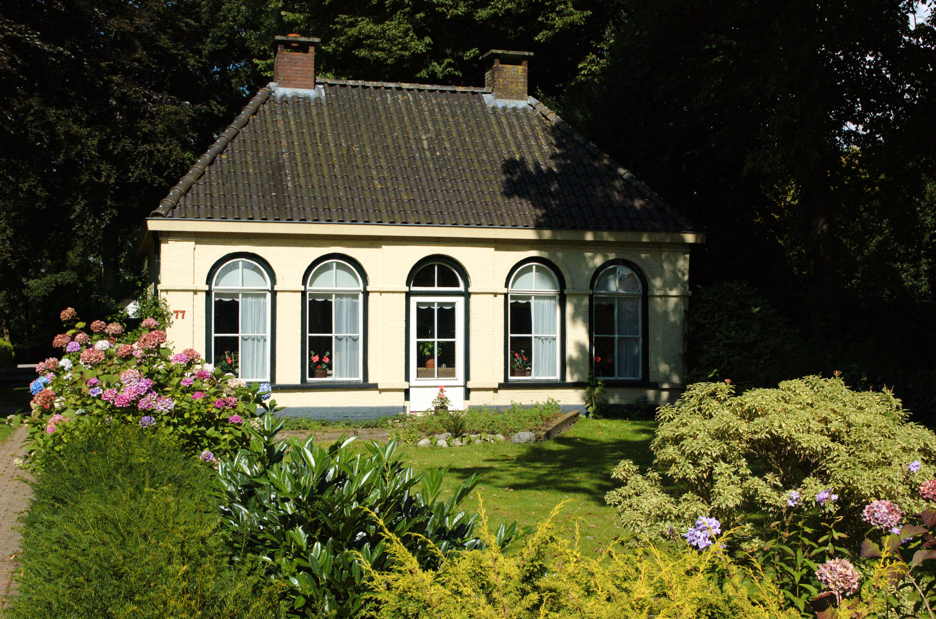 Orangerie van Glinstra-State in Burgum